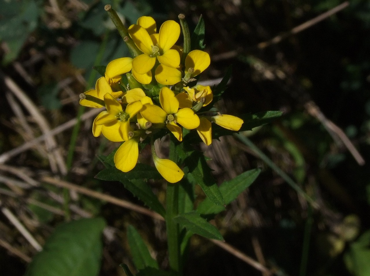 Erysimum pieninicum (siedlisko:Zamek Czorsztyński)